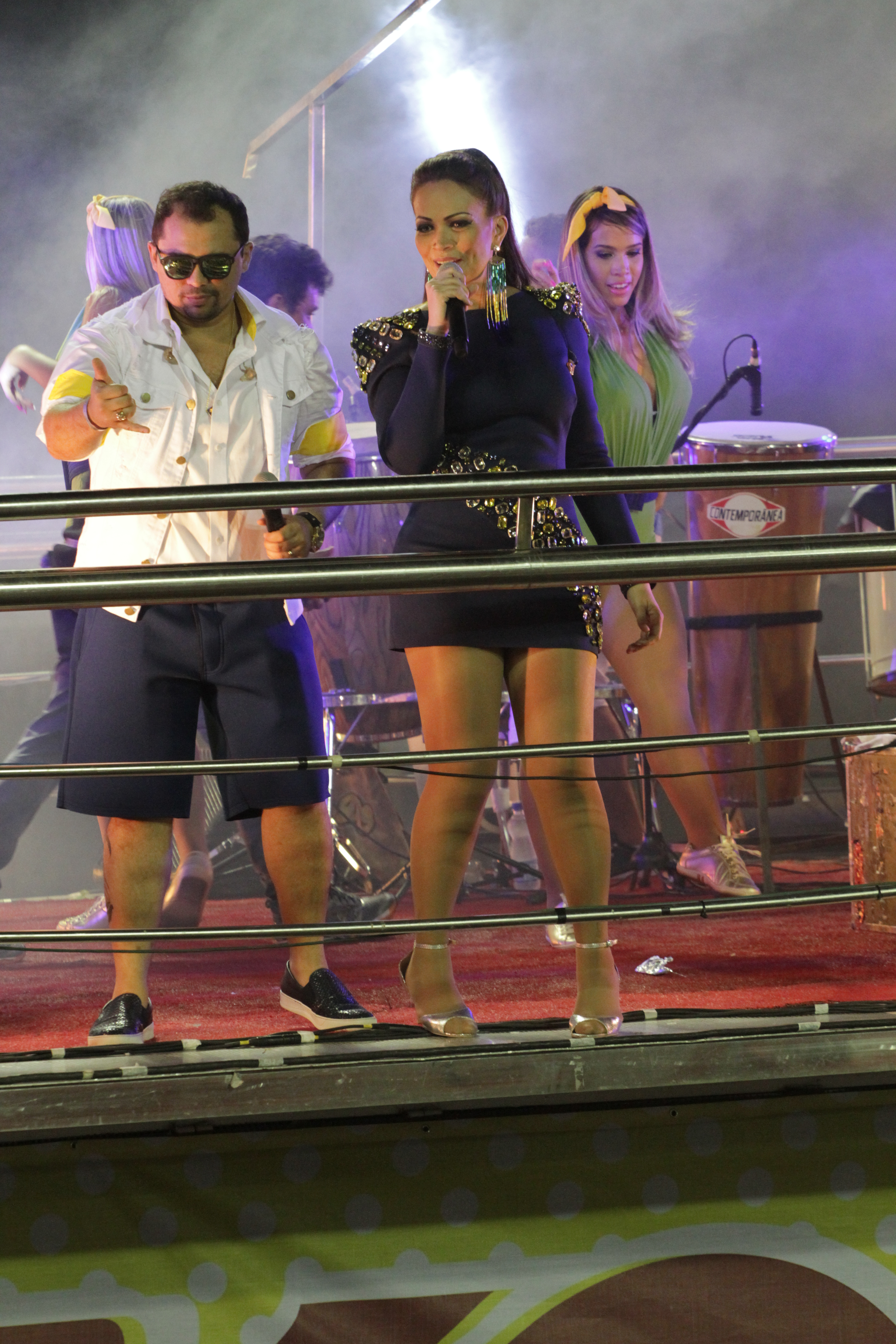 Carnaval Barra-Ondina 2014